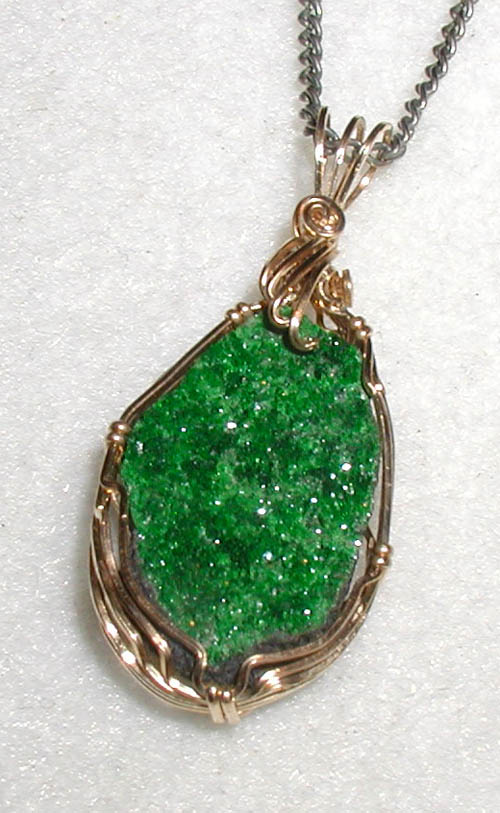 Uvarovite pendant.